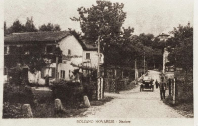 stazione di Bolzano novarese primi anni del '900